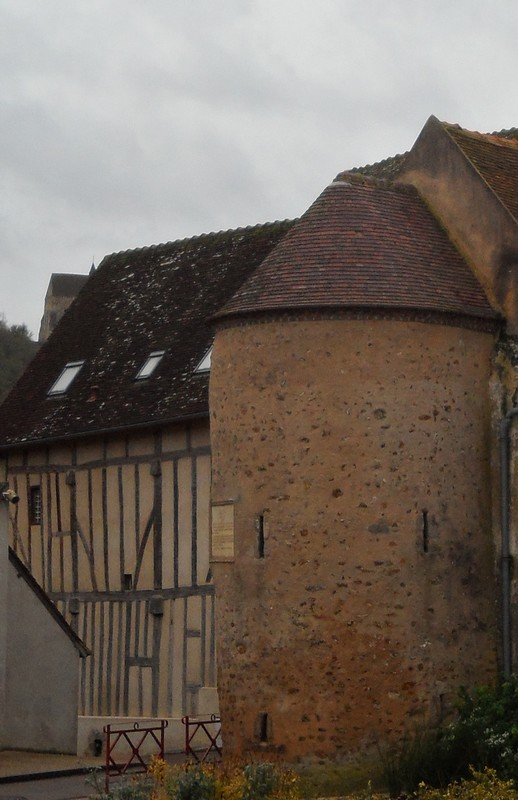 La porte de la croix et une maison de bois à Saint-Julien-du-Sault (Yonne) France